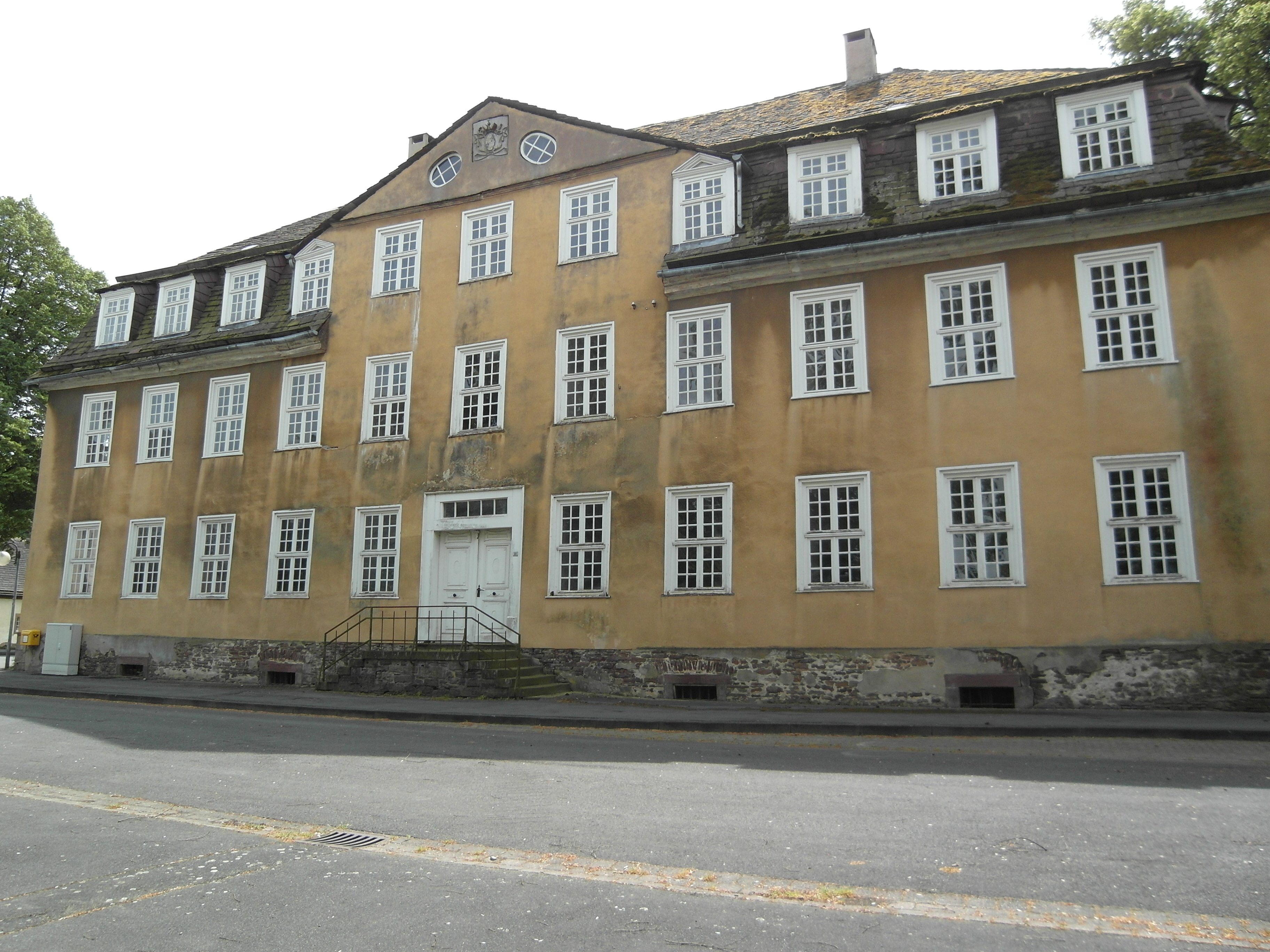 Dieses Foto zeigt das Dreizehnlindenhaus in Corvey, Höxter. This is a photograph of an architectural monument.